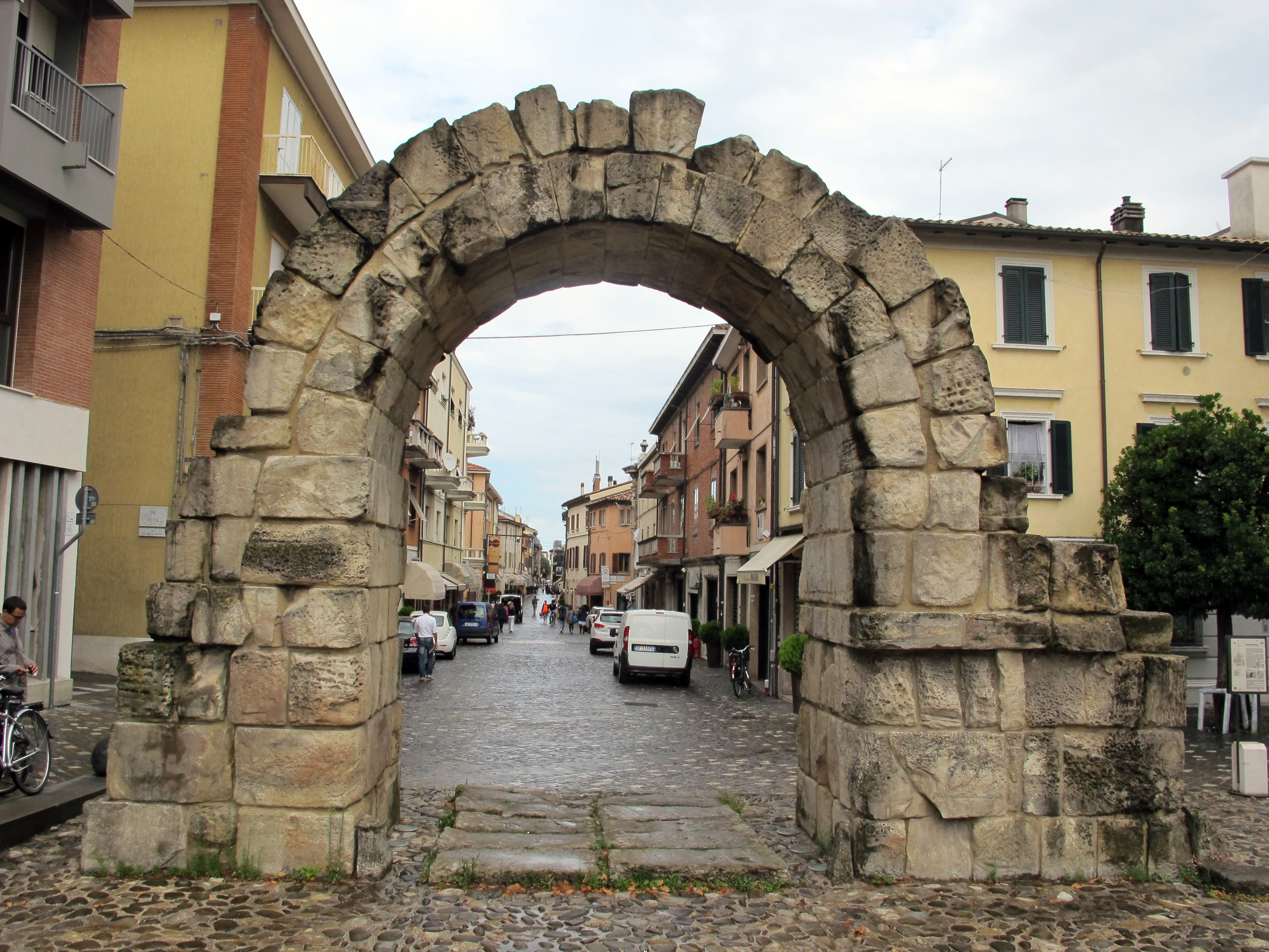 Porta Montanara - MIBAC This is a photo of a monument which is part of cultural heritage of Italy.